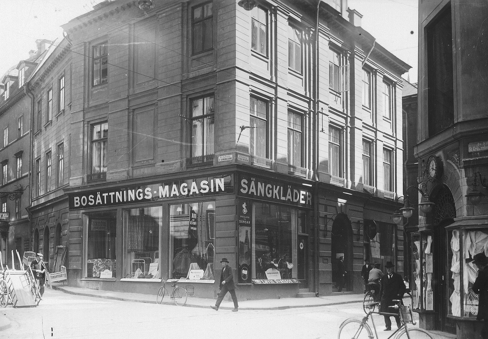 Levin Svensons Bosättnings-Magasin, Stora Nygatan 5